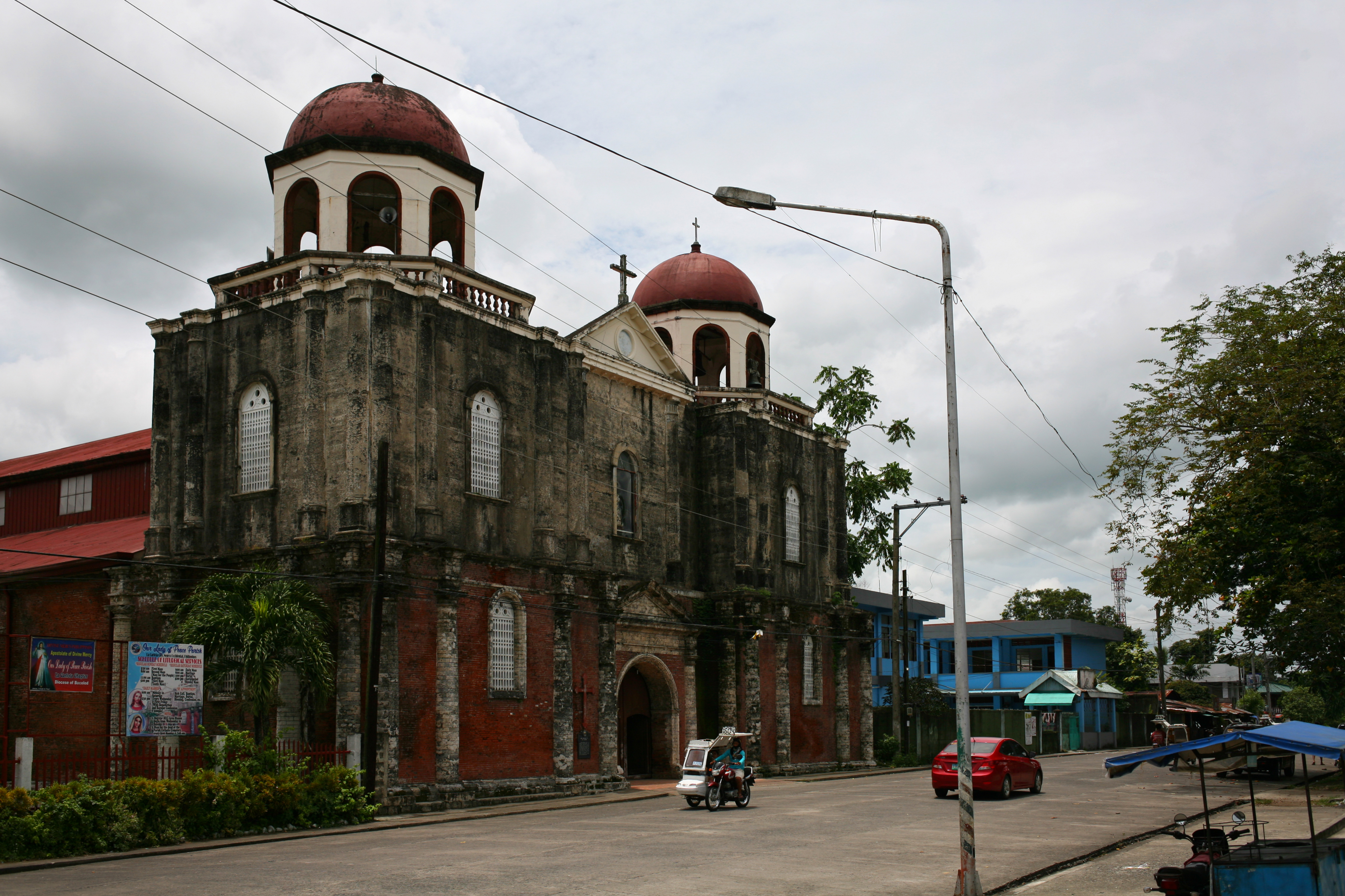 Nuestra Señora de la Paz Chiesa di La Carlota, Negros Occ., Filippine Veduta